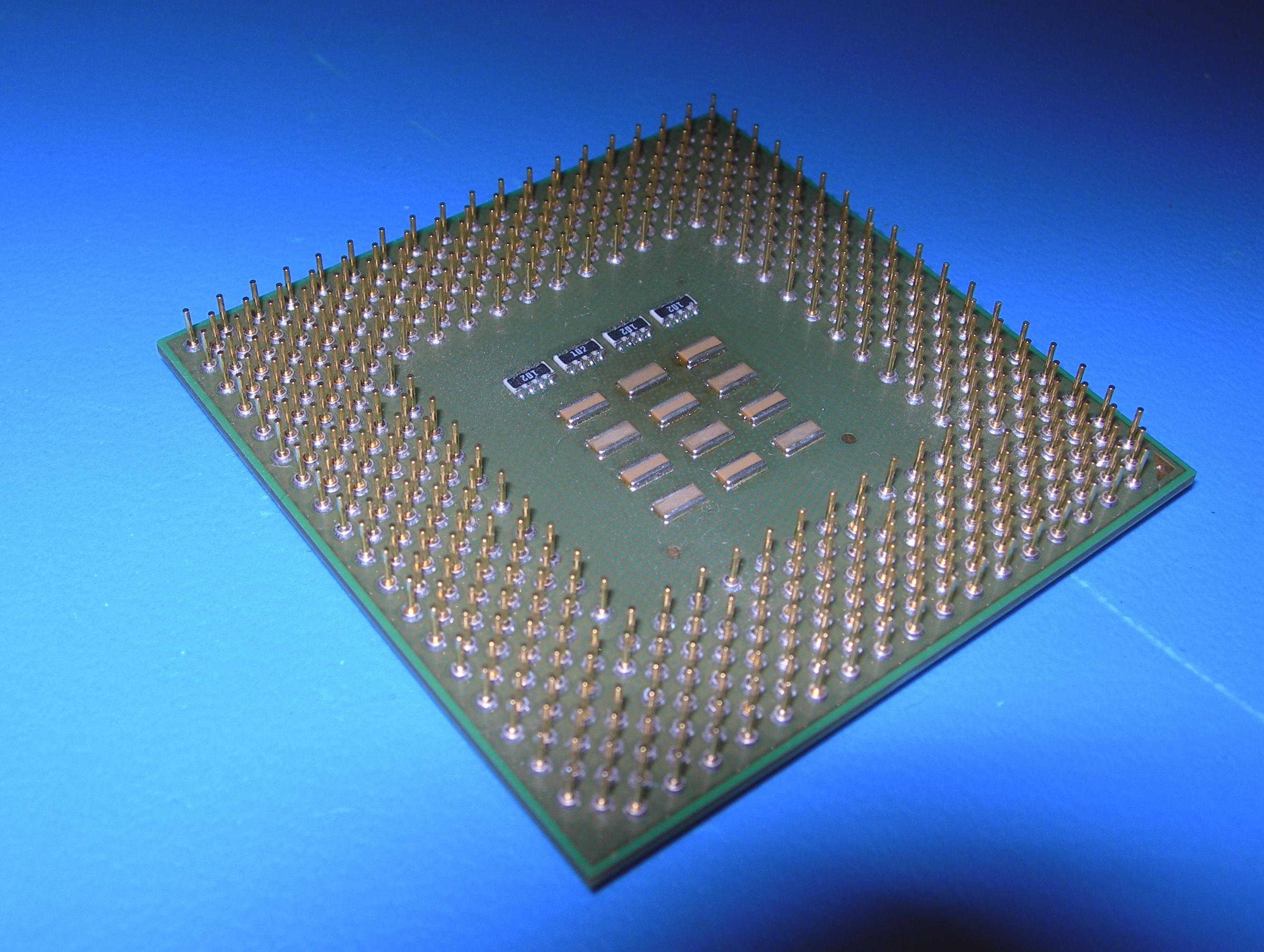 Pin Grin Array, Bauform für Elektronische Bauteile (Unterseite), AMD Prozzesor